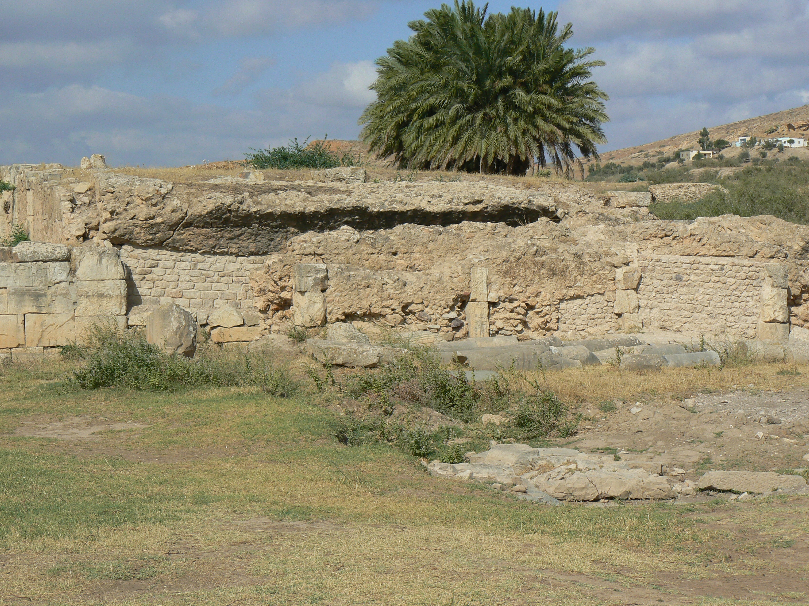 capitole de Bulla Regia